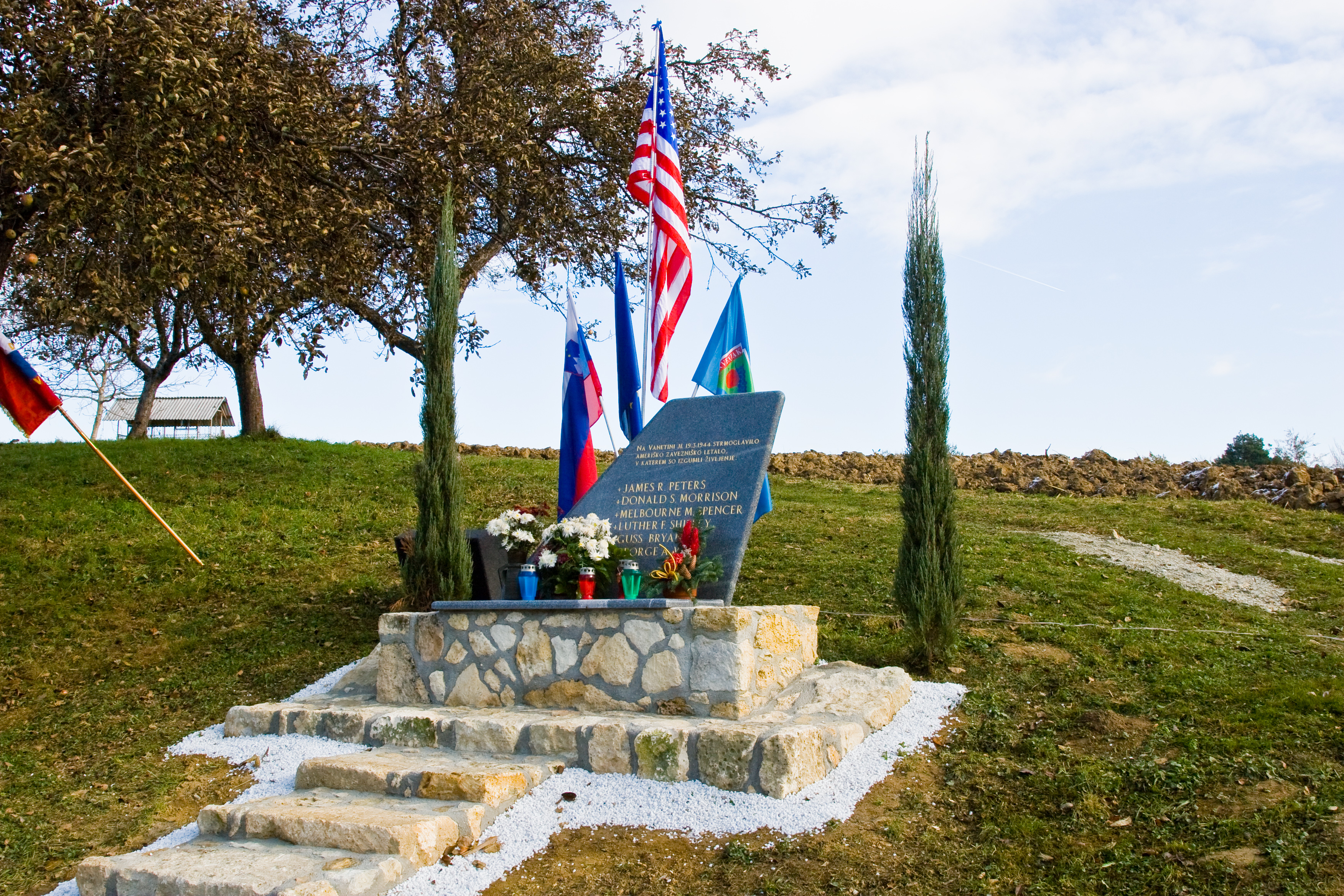 The memorial in Cerkvenjak (2005).